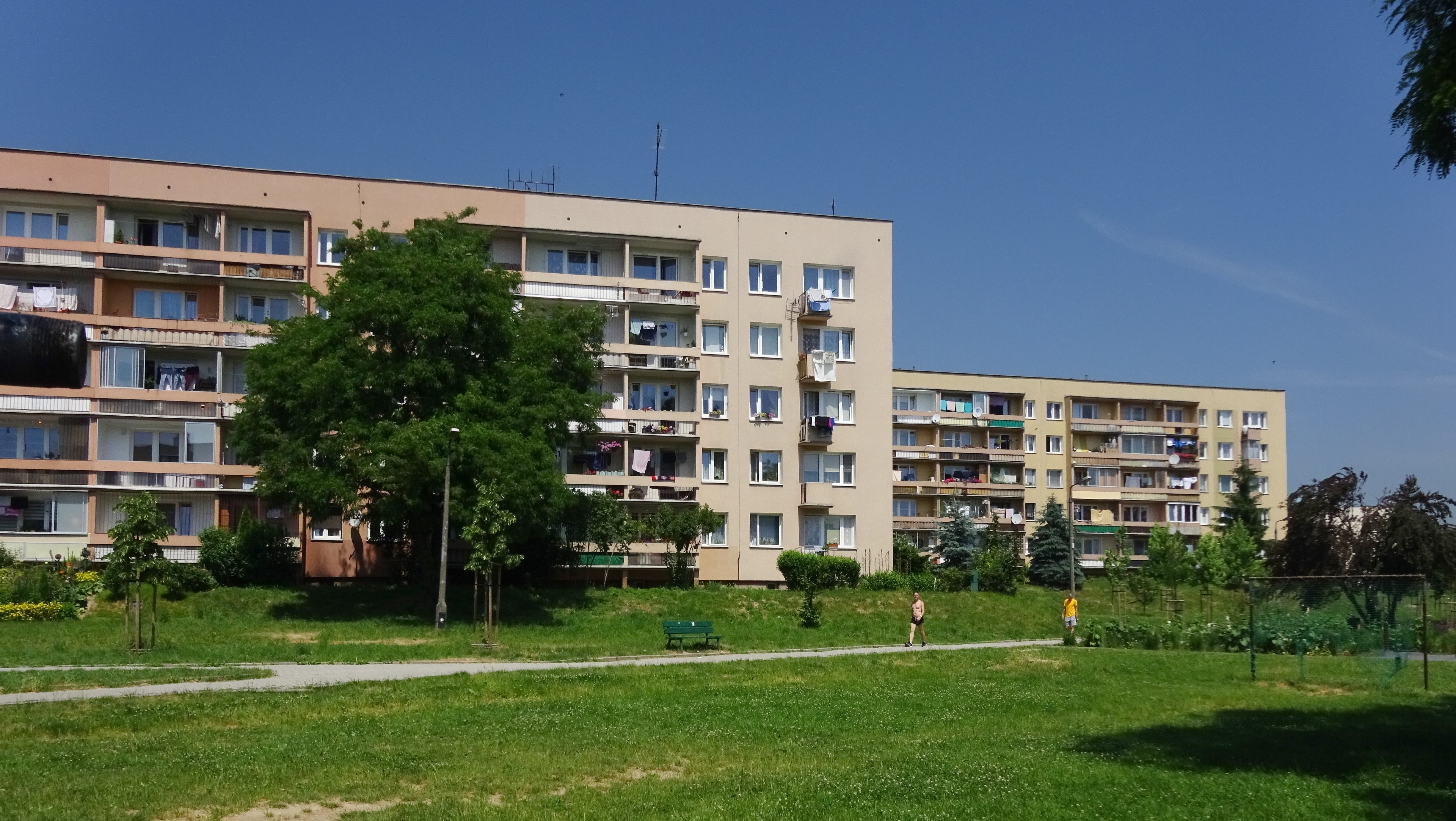 Osiedle Piastów w Krakowie. Zabudowa bloków czteropiętrowych na osiedlu - przykład ze wschodniej części, widok od południa. 2019